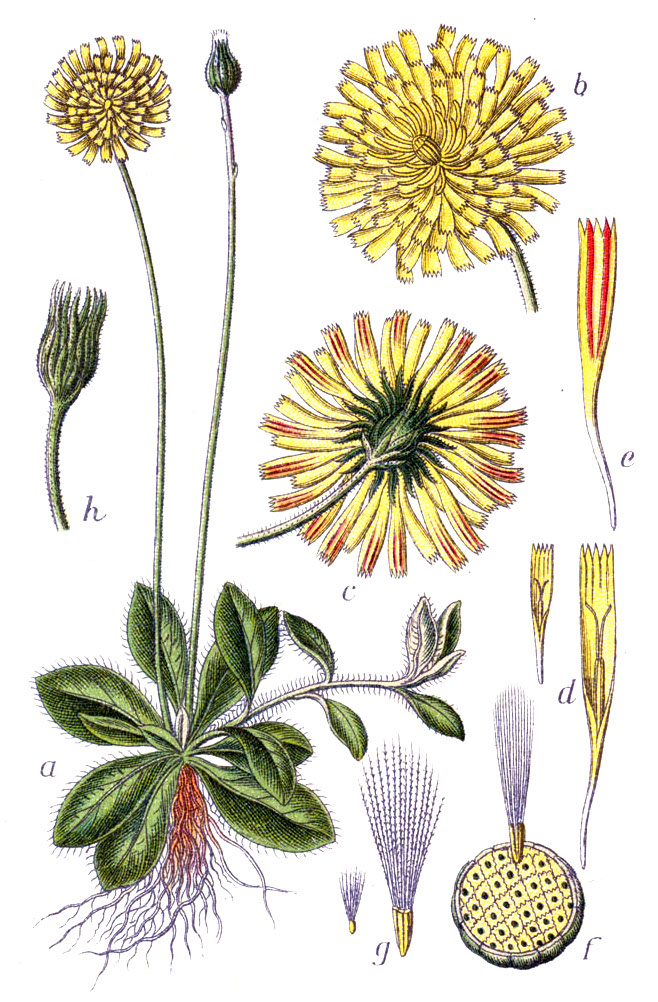 Hieracium pilosella L. Original Caption Kleines Mauseohr, Hieracium pilosella